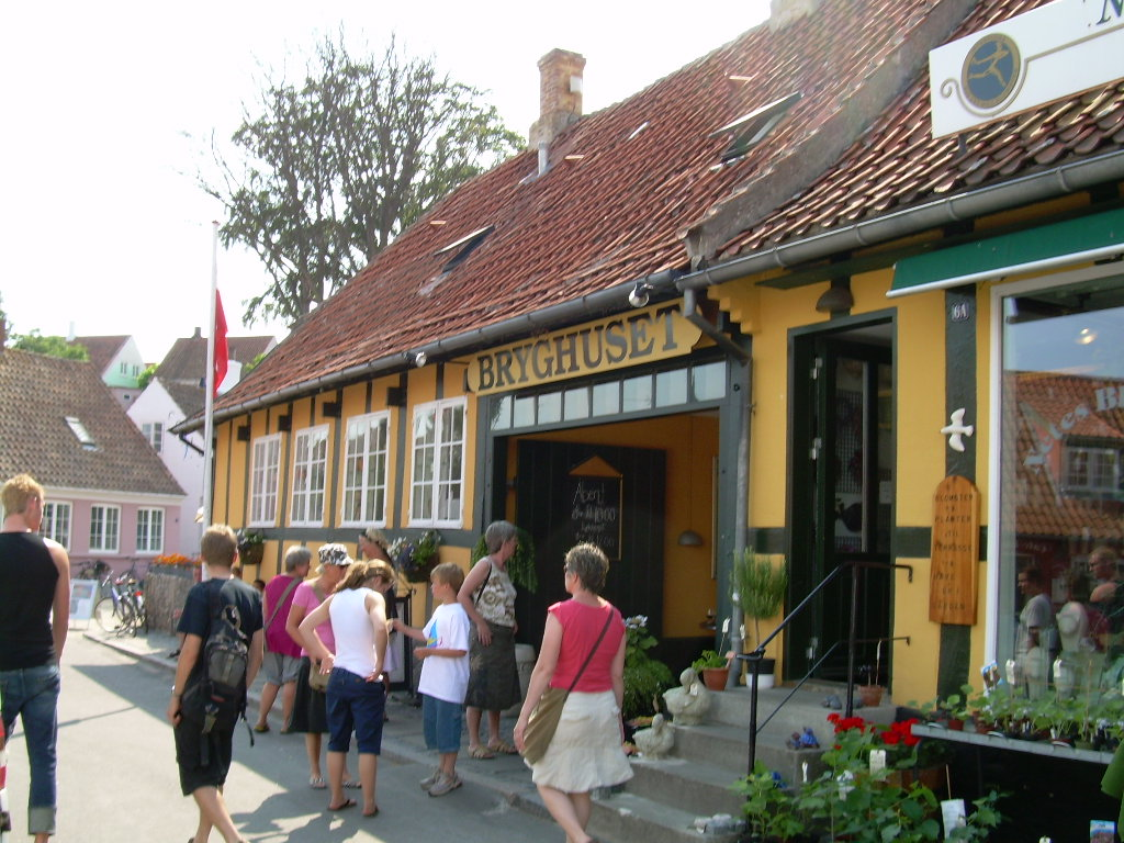 Svaneke Brewery, Svaneke, Bornholm, Denmark